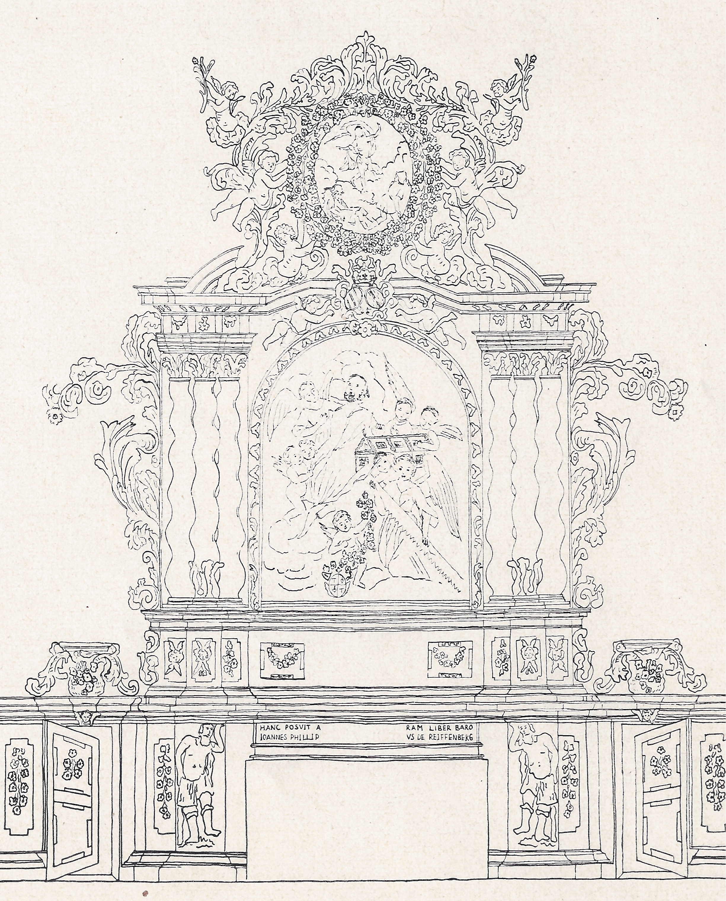 Abtei Sayn, Barockaltar 1709, unvollständige Rekonstruktion